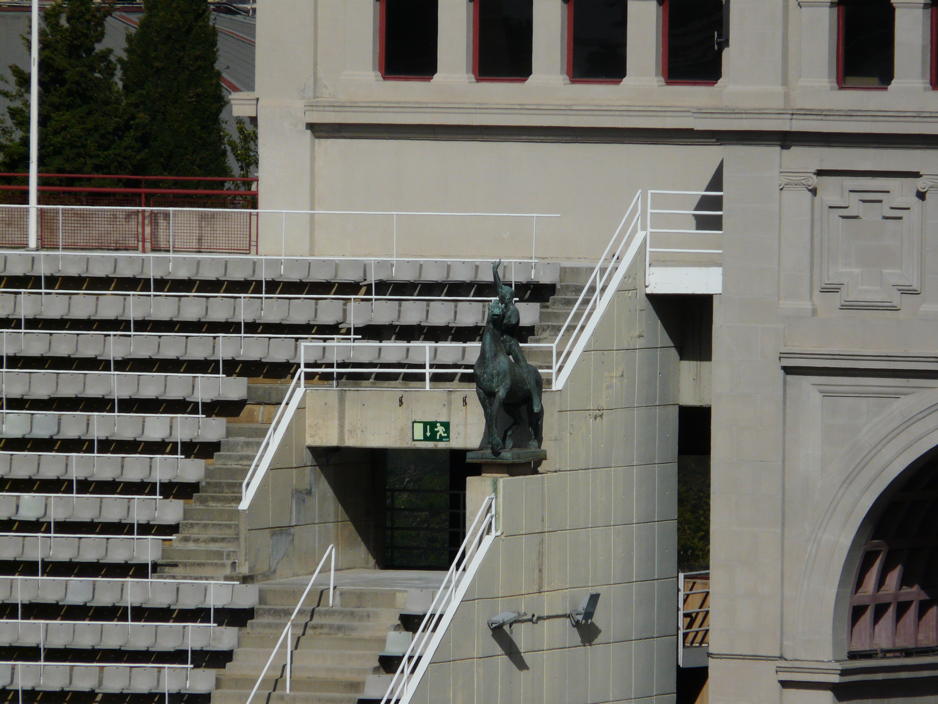 Els genets. Estadi Olímpic de Montjuïc Lluís Companys (Barcelona). Escultor: Pau Gargallo. Material: bronze. 1928-1929, restauració 1989. 2″ N, 2° 09′ 20.38″ E